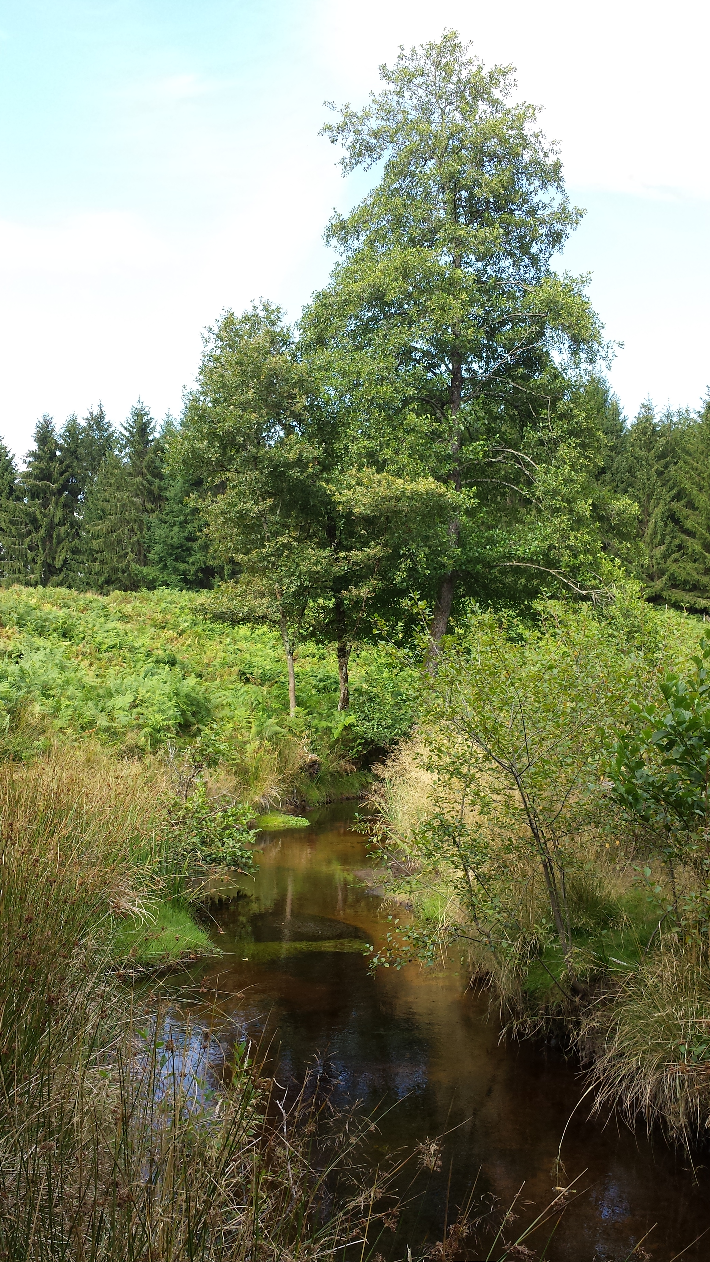 Ruisseau de Boulou, entre les communes d'Affieux (à gauche) et Madranges (à droite) ; Corrèze, France. Photo prise depuis la rive droite, en direction de l'amont, environ 400 à 500 mètres en amont du hameau de Boulou.